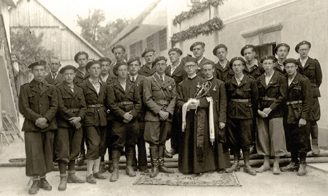 Grahovska posadka vaške straže na novi maši mali g.Šege: V sredini France Kremžar — v zadnji vrsti na desni France Balantič